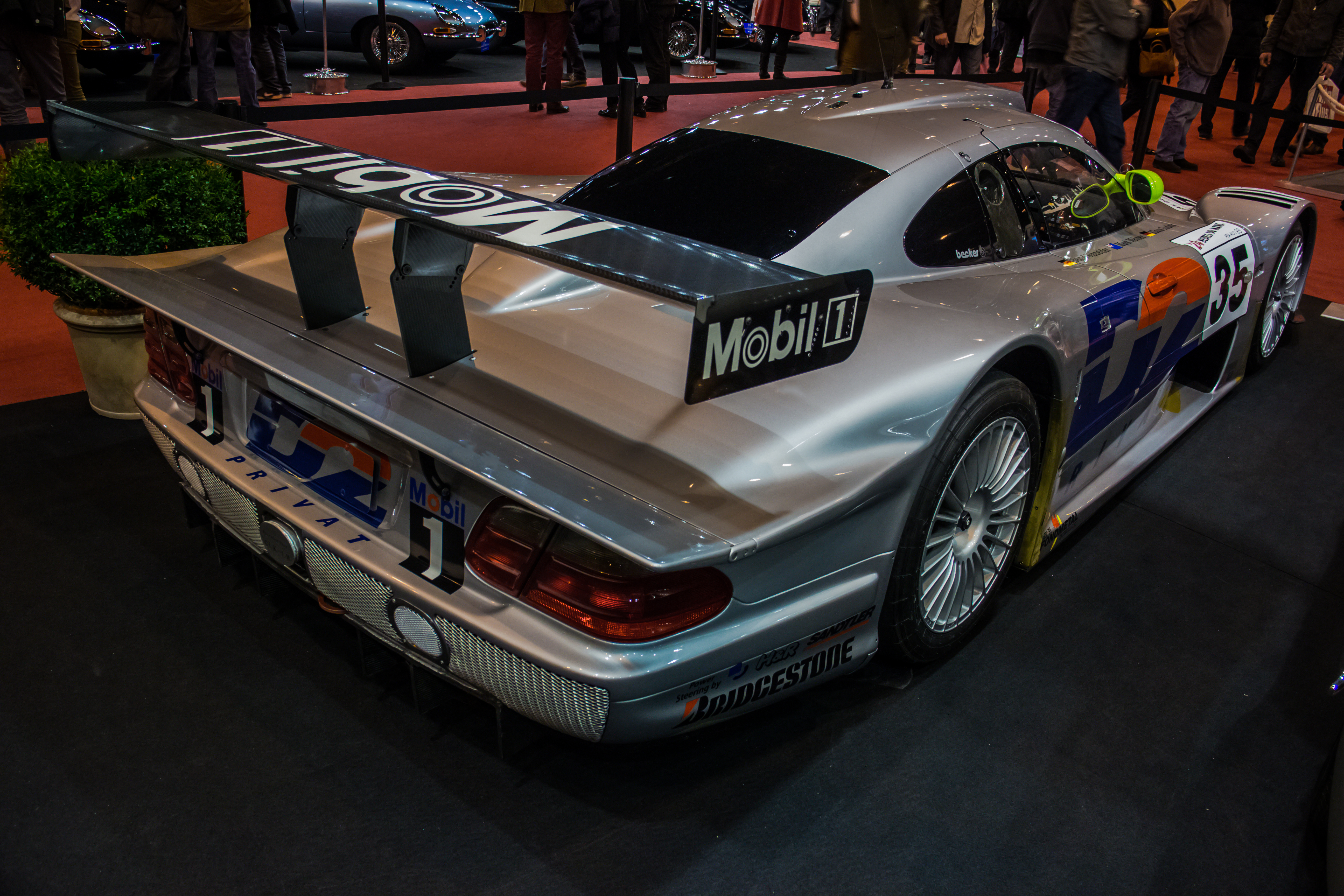 Mercedes CLK GTR